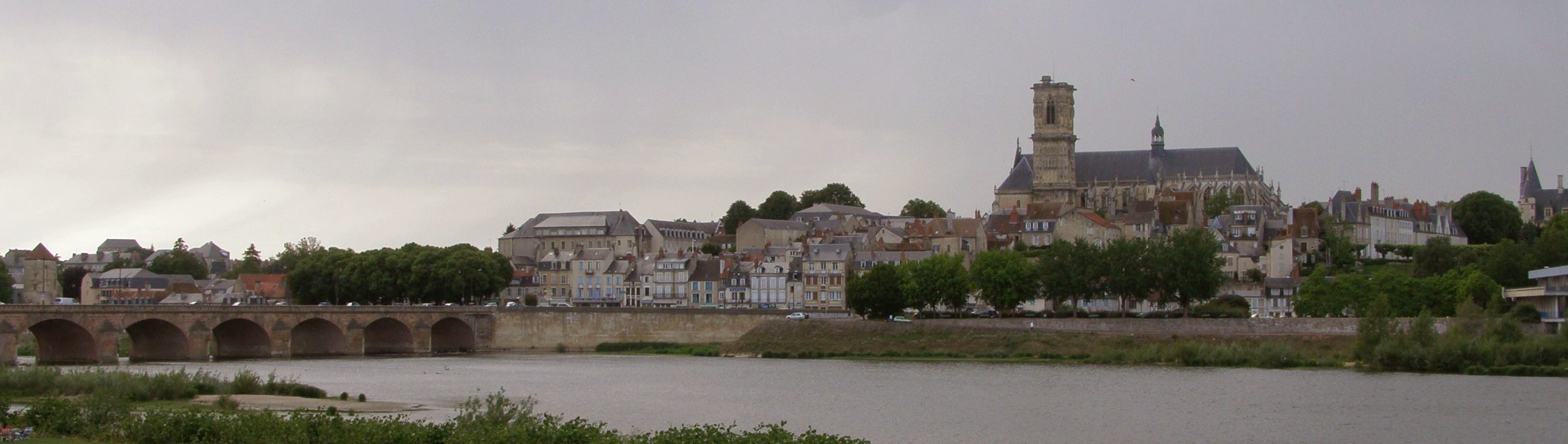 Nevers - Vue d'ensemble de la ville depuis la rive sud de la Loire